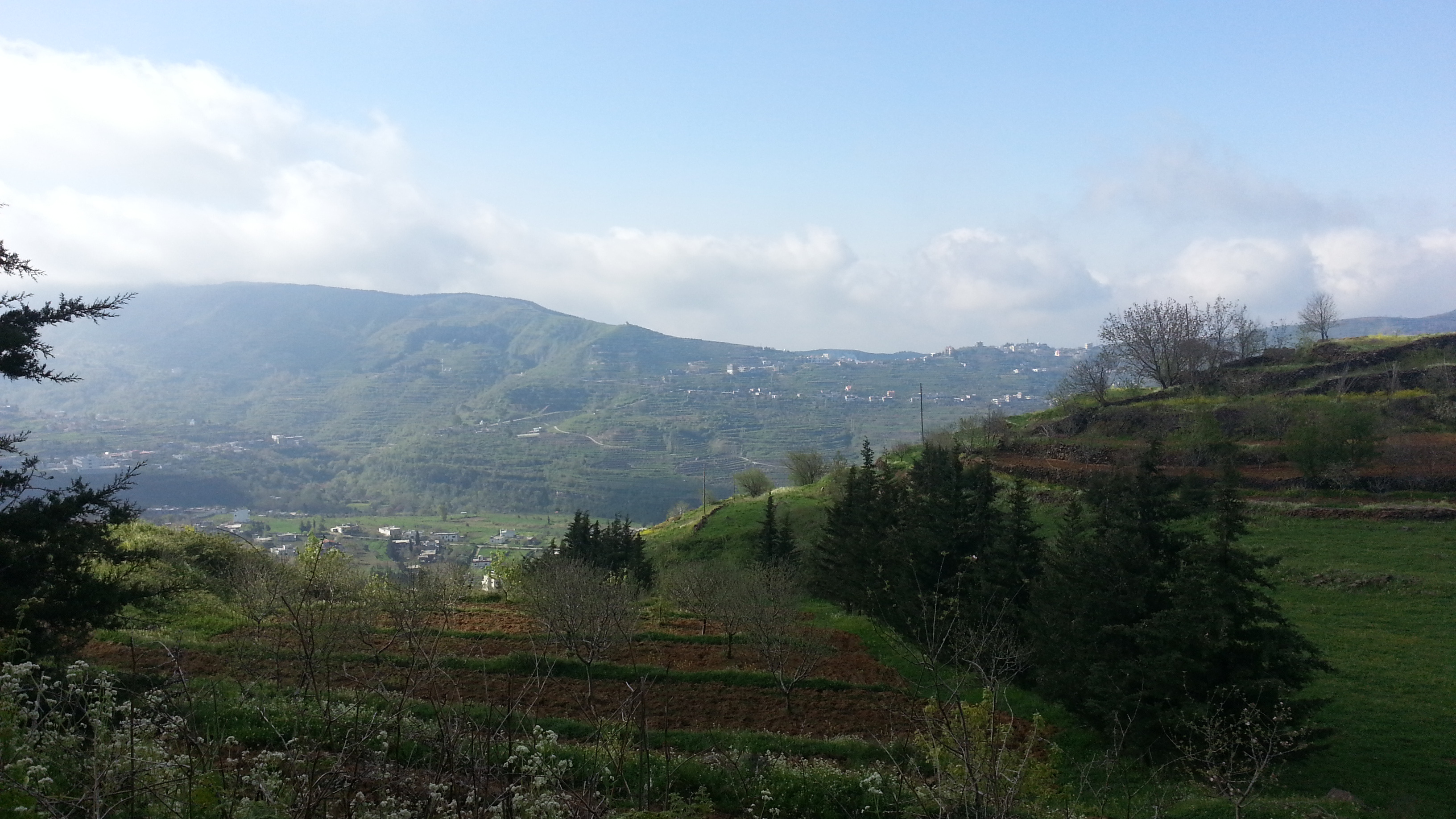 الدريكيش طرطوس